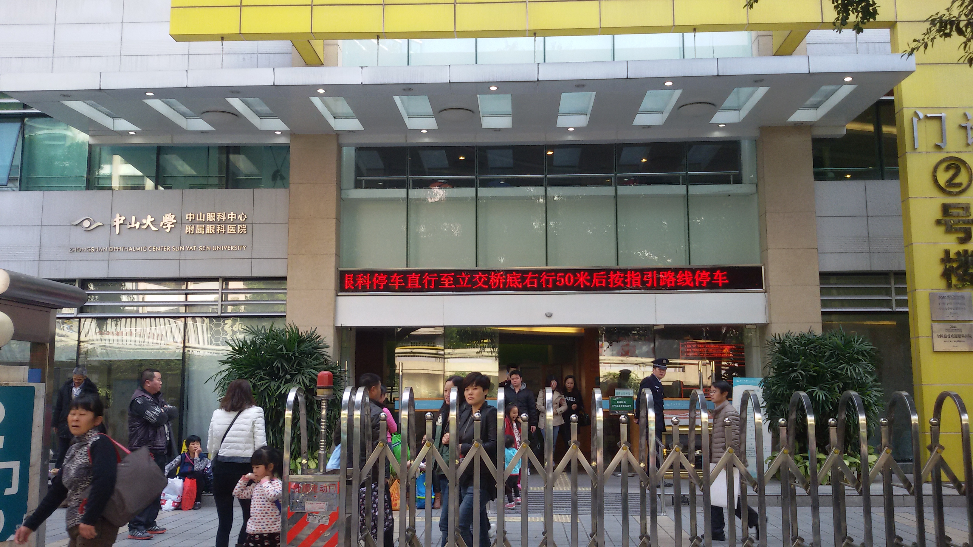 粵語: 中山大学中山眼科中心